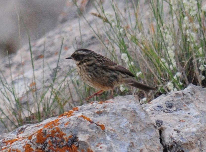 Radde's Accentor Prunella ocularis, Çamardı, Niğde, Turkey